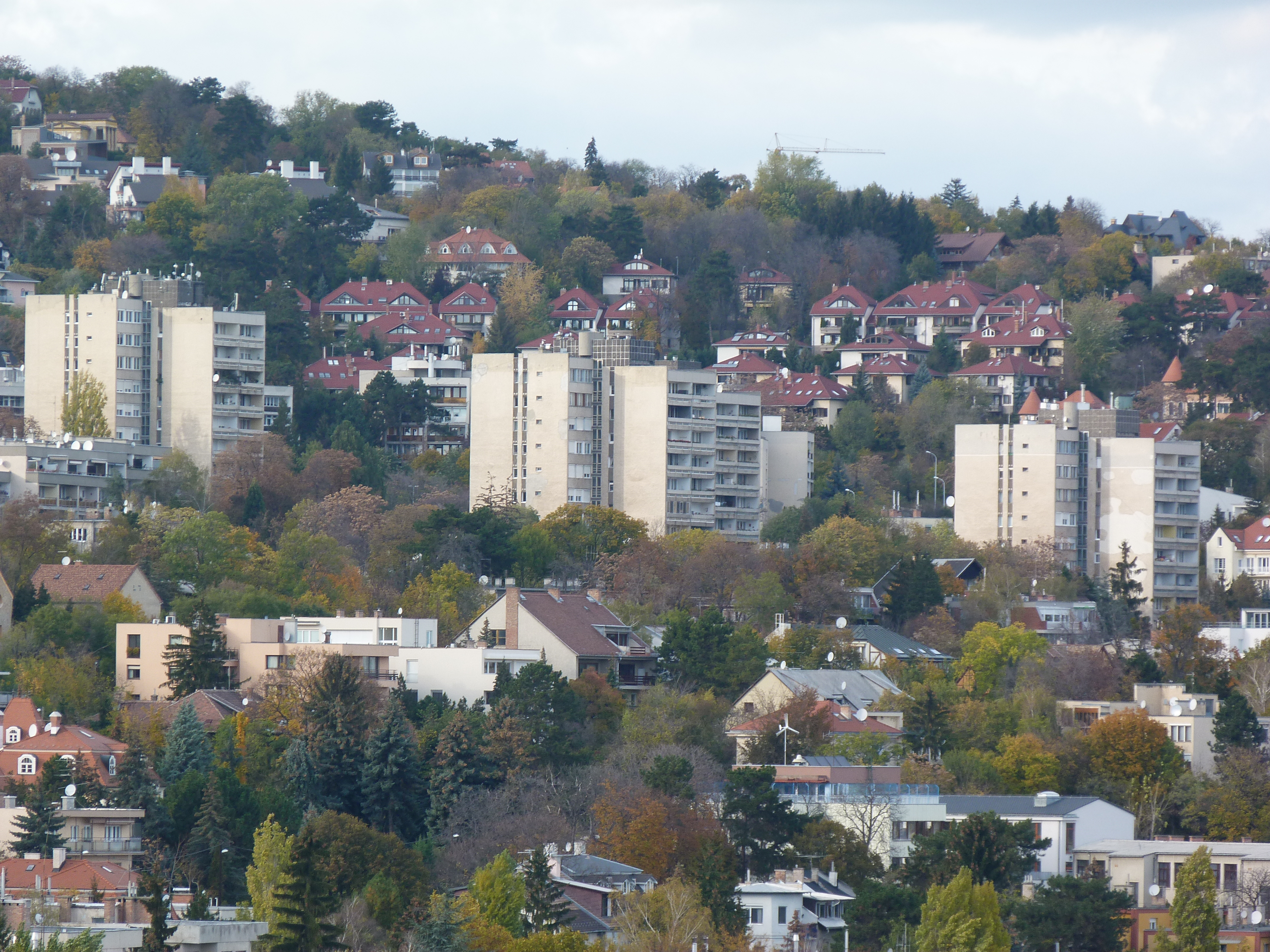 A felvétel 2012. november 4 -én készült Budapesten, a Sashegy 3. számú magaslati pontjáról. Fodor utcai lakótelep